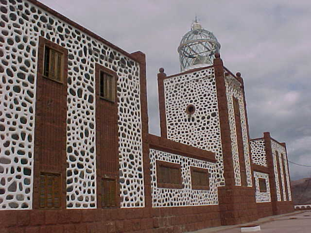 Faro de La Entallada, Tuineje, Fuerteventura (provincia de Las Palmas, España)